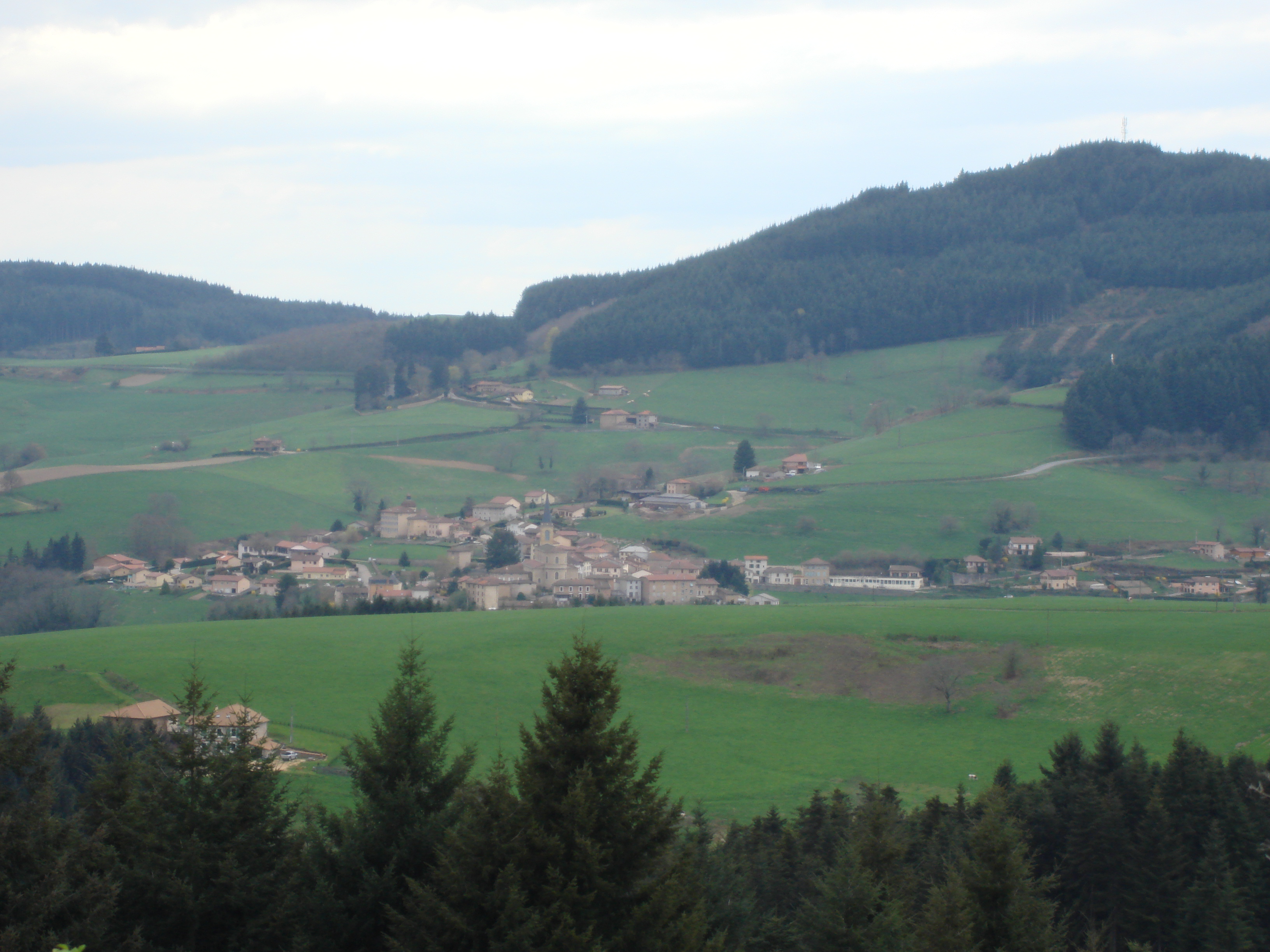 Vue du village de St Vincent-de-Reins